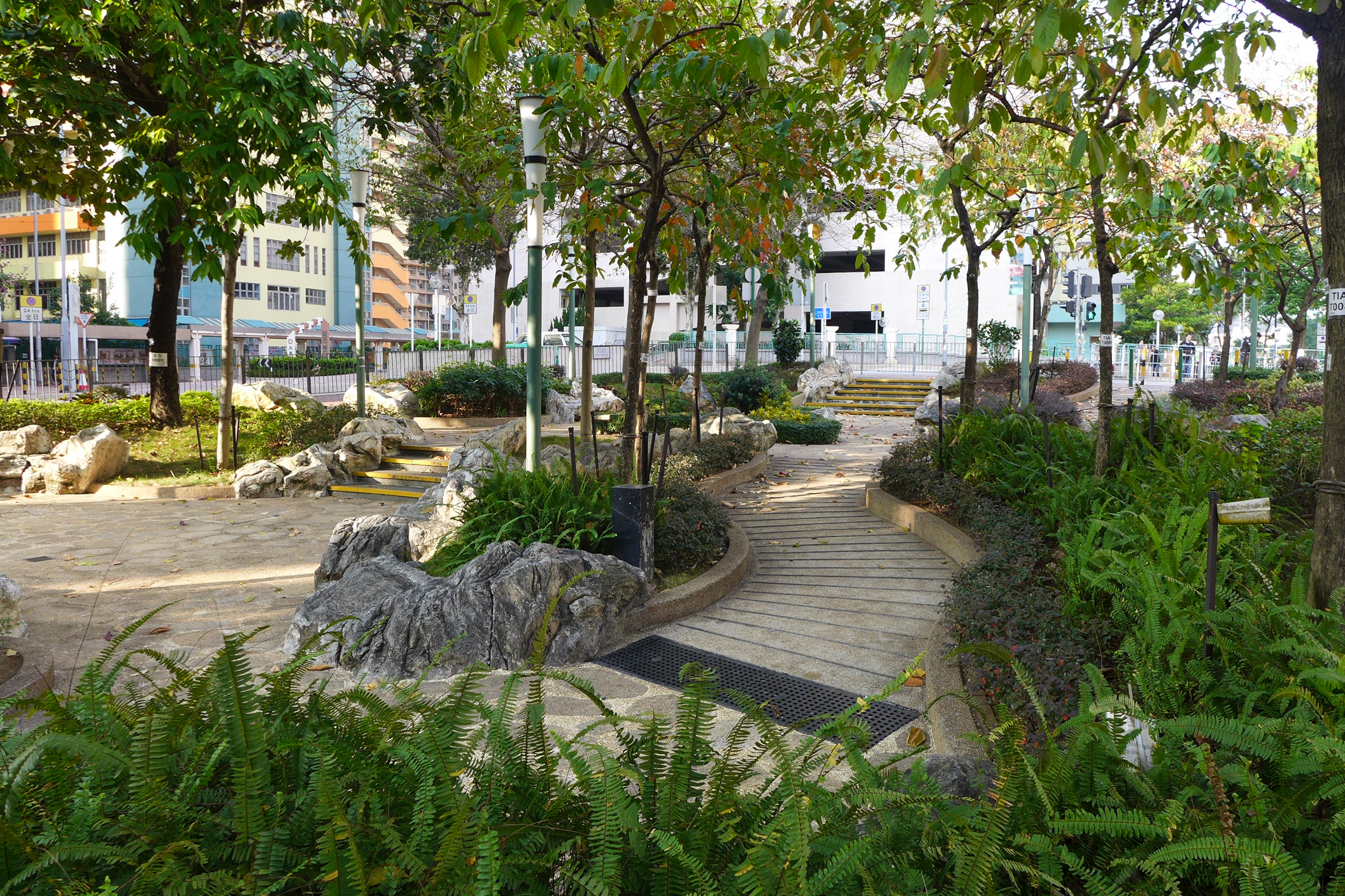 Tin Yan Estate open space